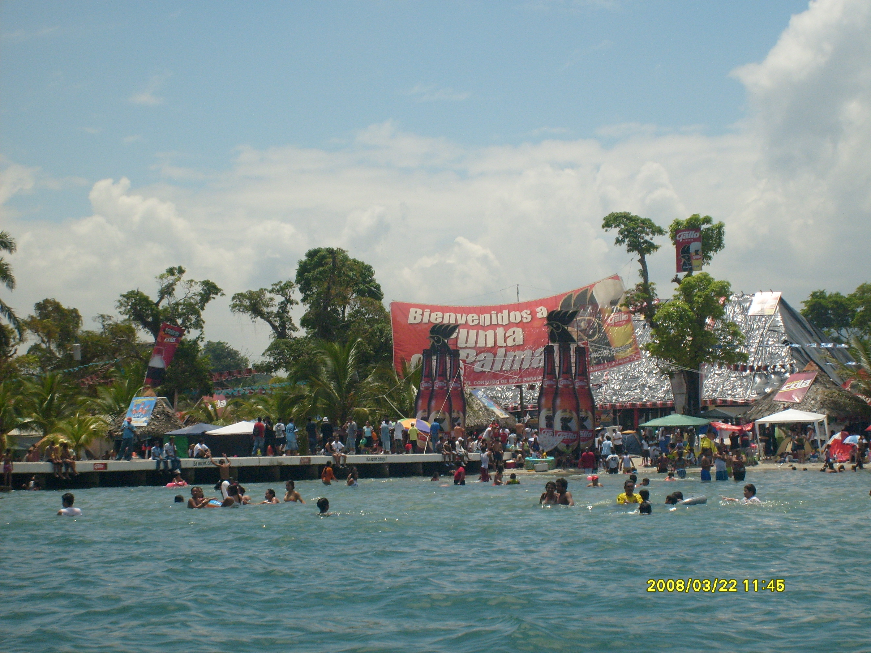 Semana Santa, Punta de Palma, Izabal, Guatemala